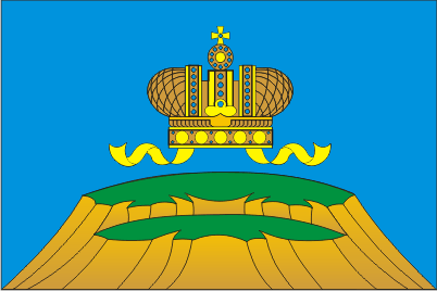 Флаг Мариинский Посад